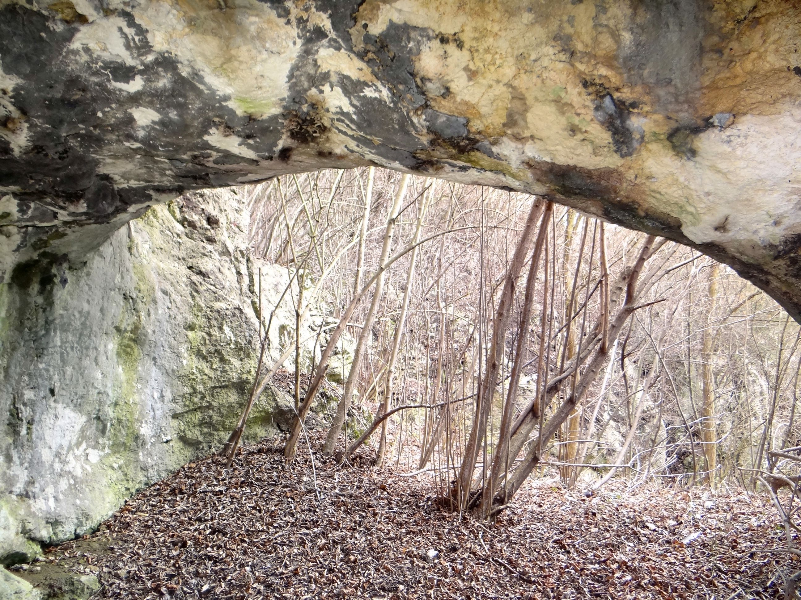 Schronisko Puste